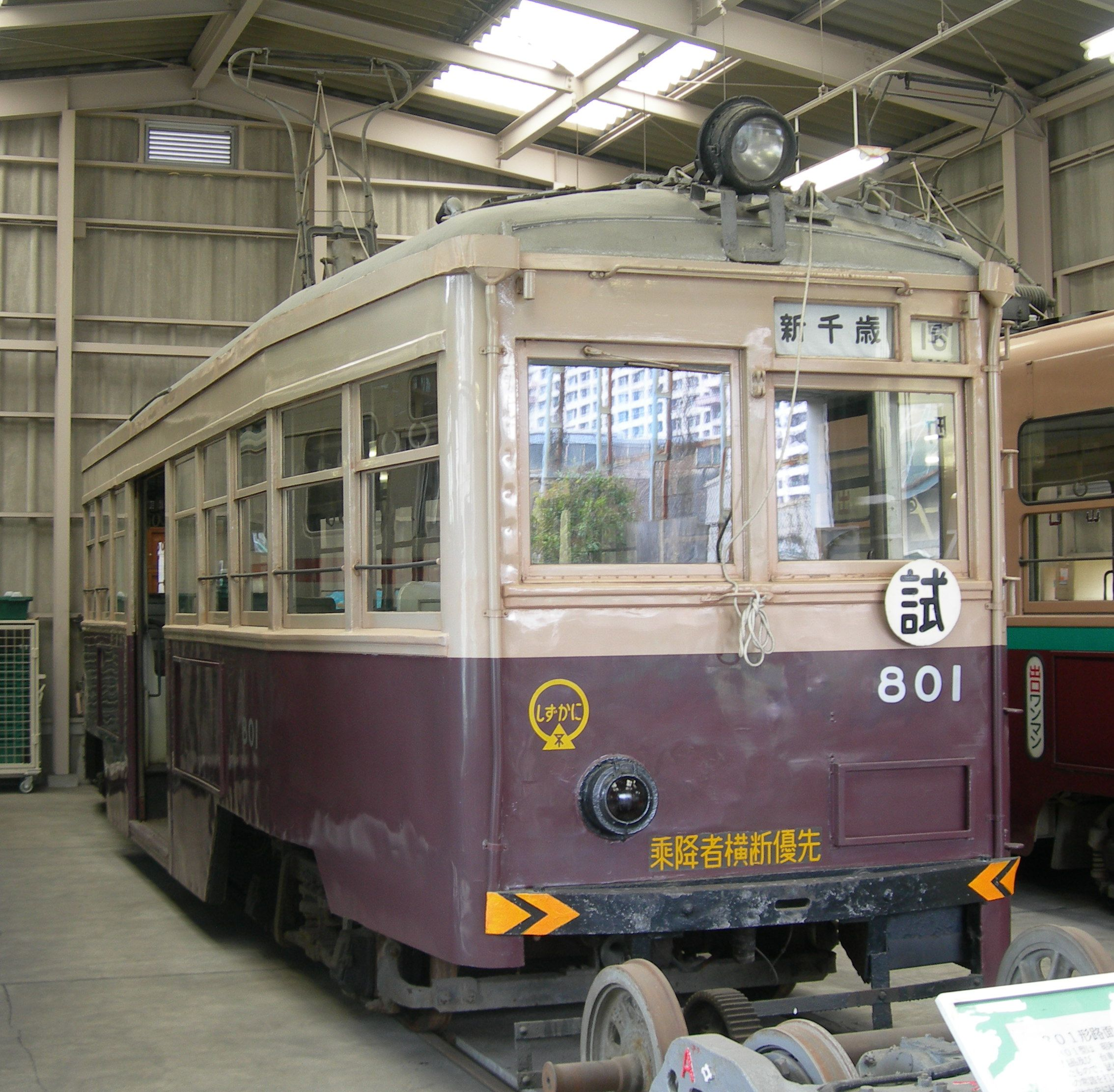 大阪市交通局801形電車801号